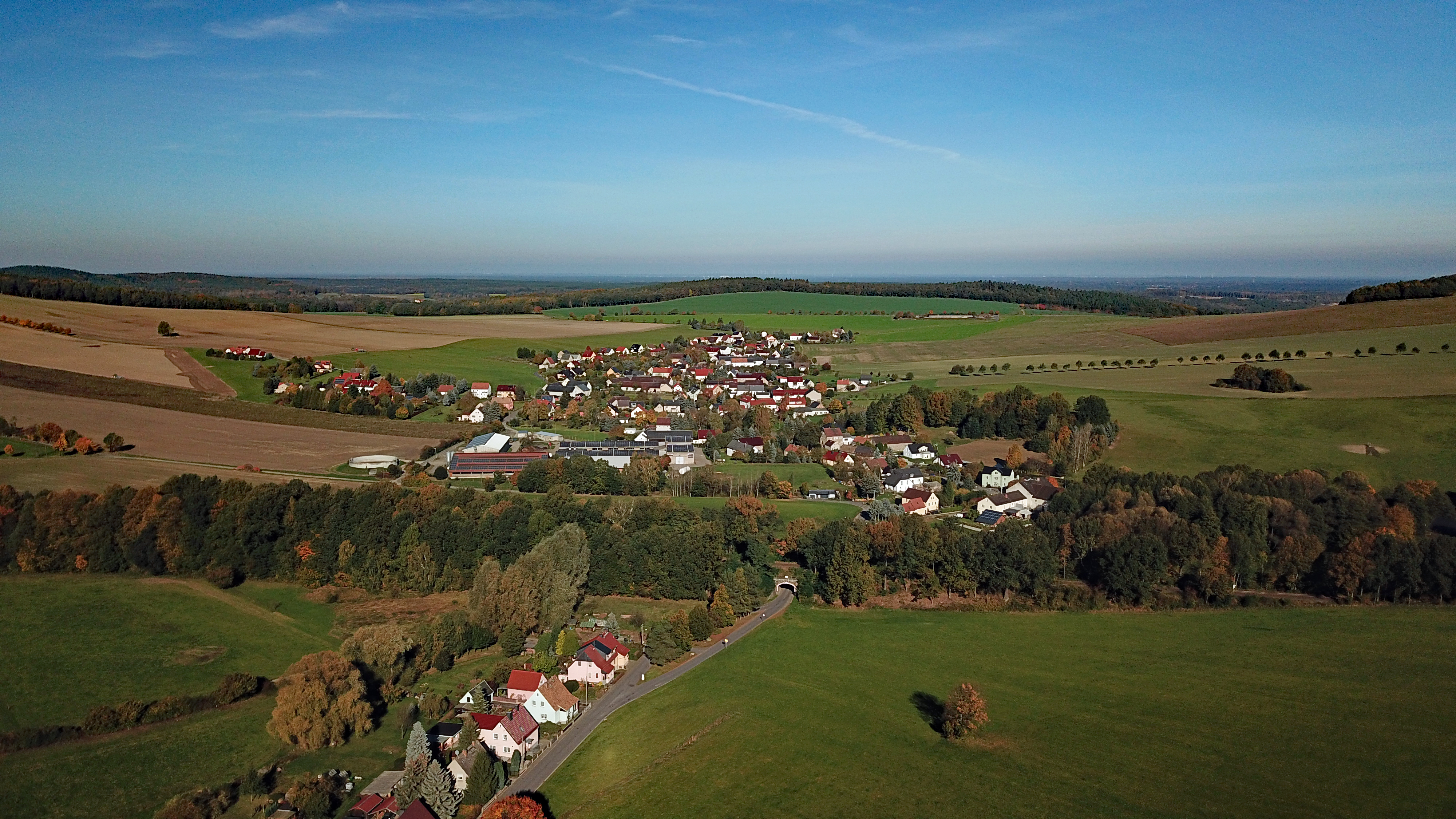 Lückersdorf (Kamenz) aus der Luft (Blick nach Nordwesten; von Gelenau aus gesehen)